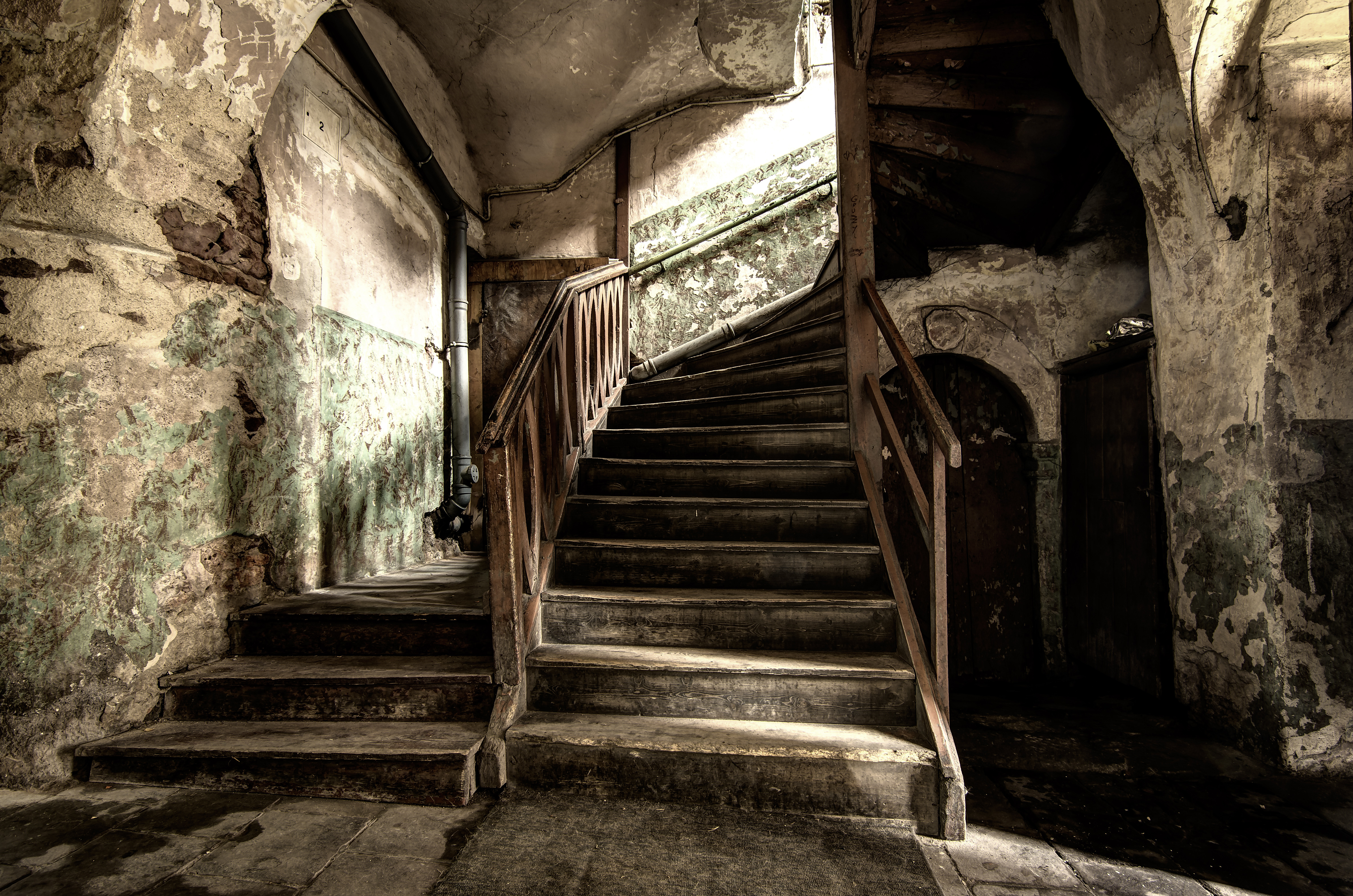 Nowa Ruda, dom ul. Kościelna 12